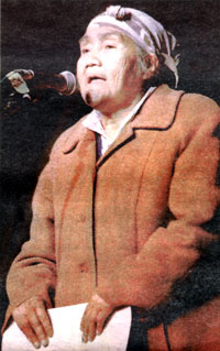 Muer Huilliche de Chiloé